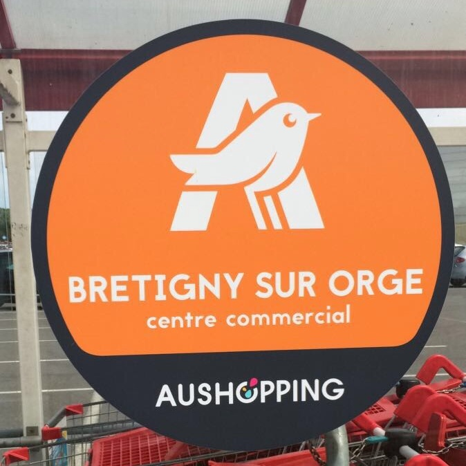 logo du centre commercial sur le parc à caddies